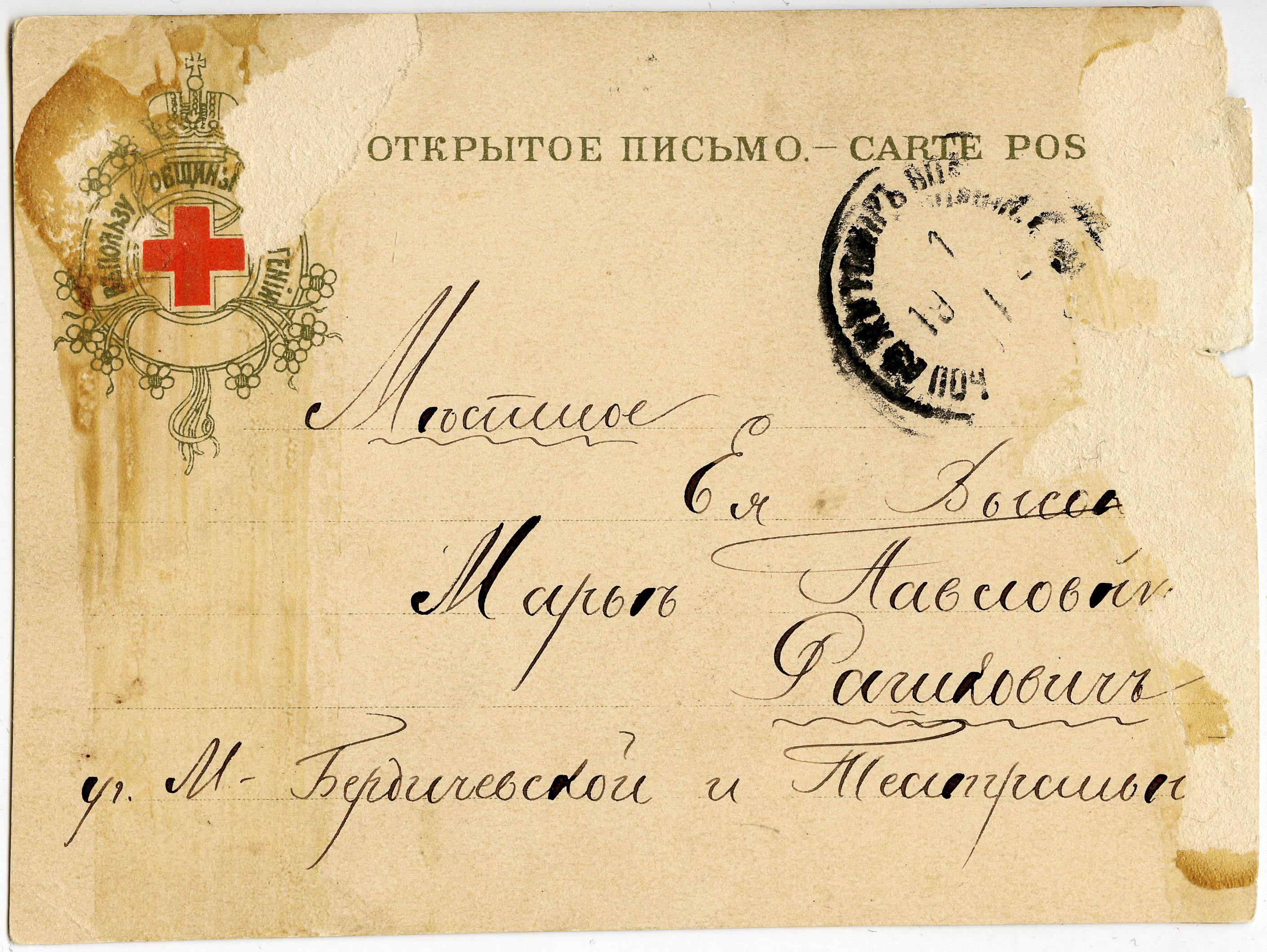 Открытка на имя Марии Павловны Рашкович. г. Кишинёв.